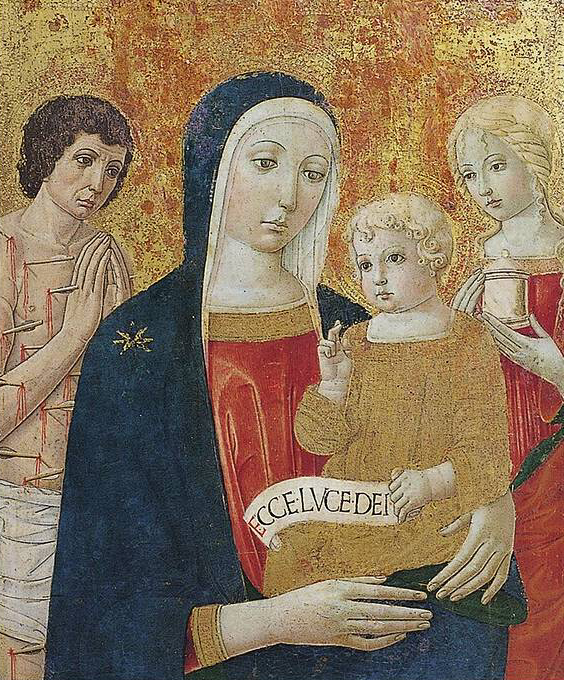 Saturnia, chiesa di santa maria maddalena, Madonna col Bambino fra San Sebastiano e Santa Maria Maddalena, attribuita a Benvenuto di Giovanni, della fine del sec. XV,.jpg